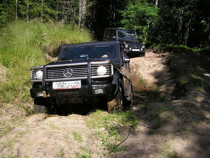 Гелендваген Клуб - брод